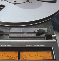 Revox B77 VU Meter